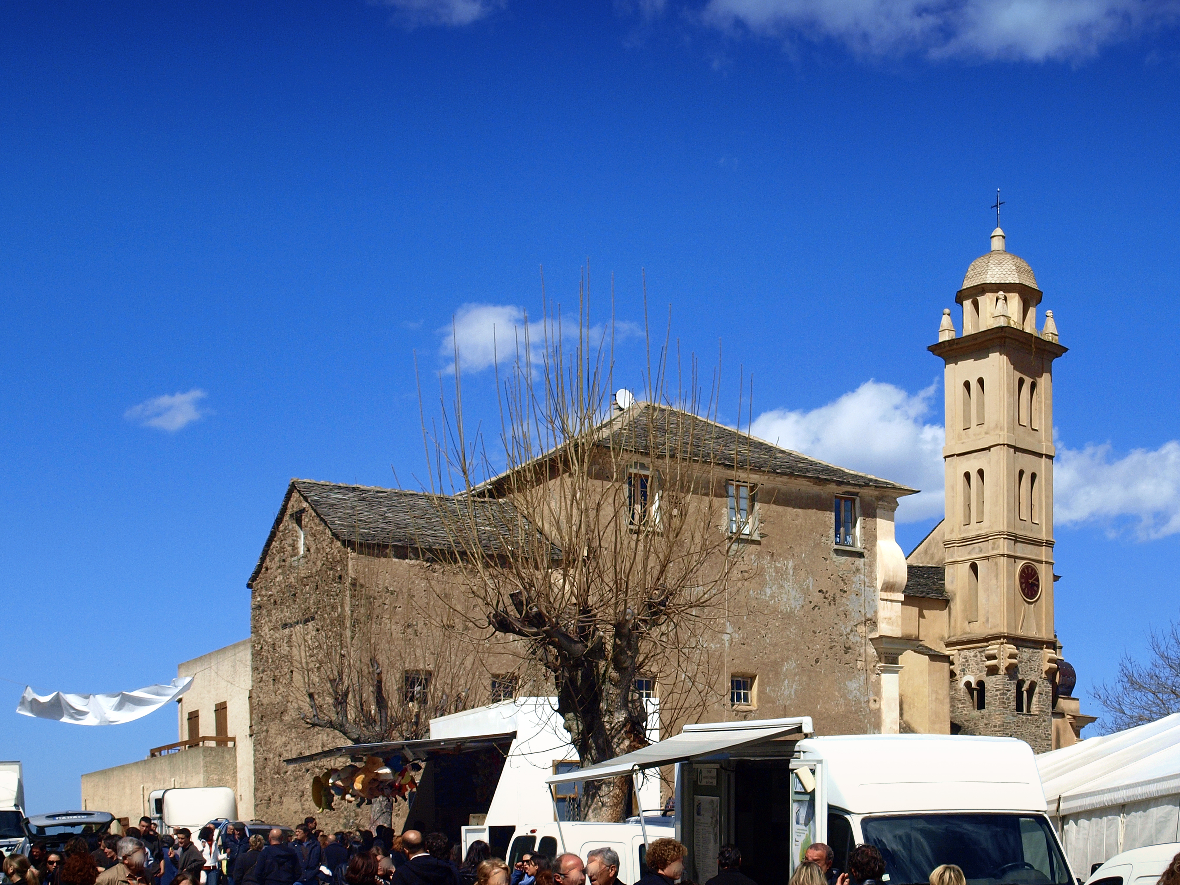 Piedicroce, Castagniccia (Corse) - Merendella 2010 autour de l'église Saint-Pierre et Saint-Paul